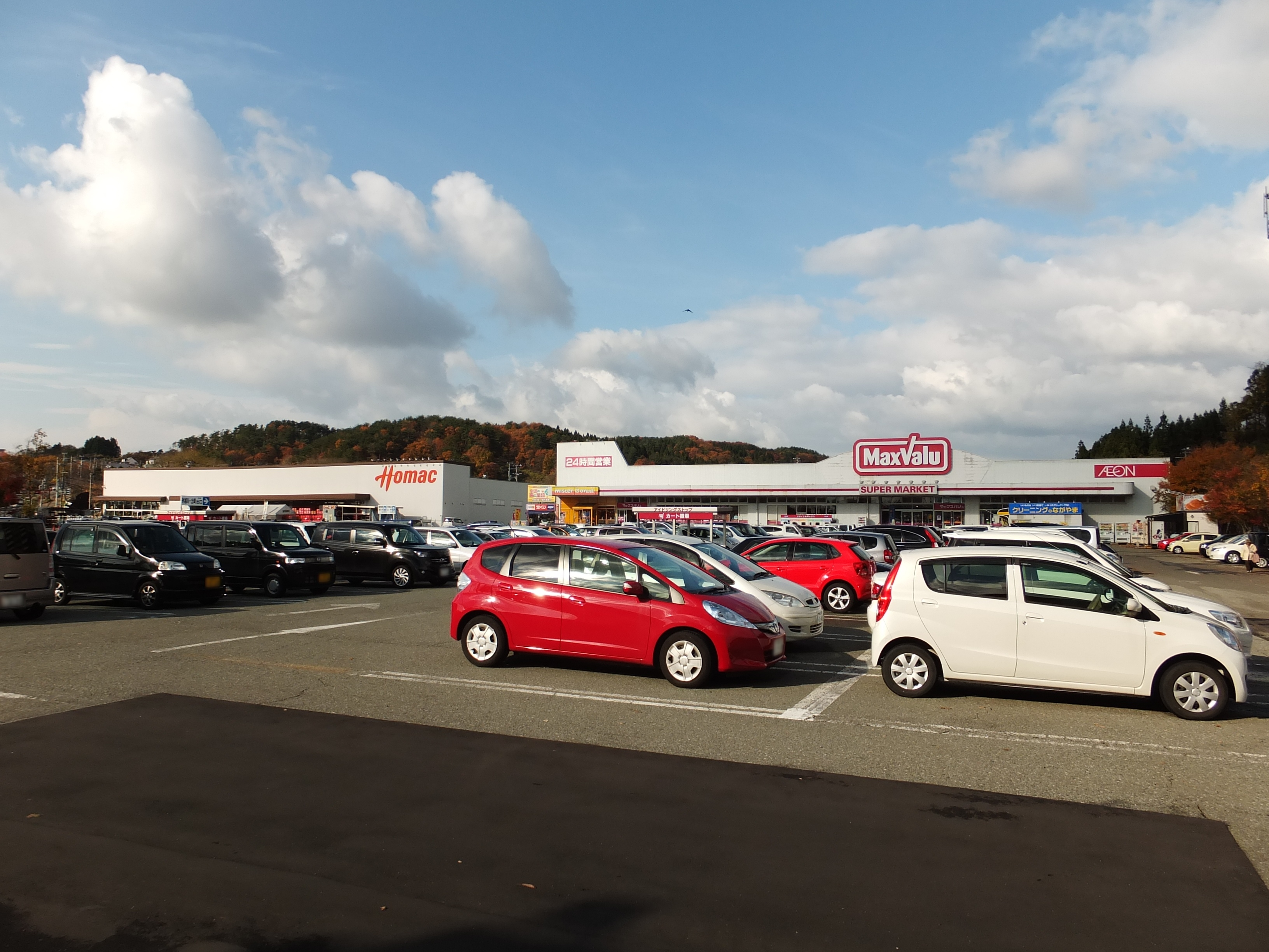 広面ショッピングセンター。ホーマック広面北店(開業当初はメガマート)とマックスバリュ広面店(開業当初はウエルマート)を皮切りに店舗が拡充されていった。